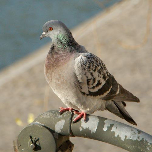 Photo d'un pigeon prise dans une rue de Paris.